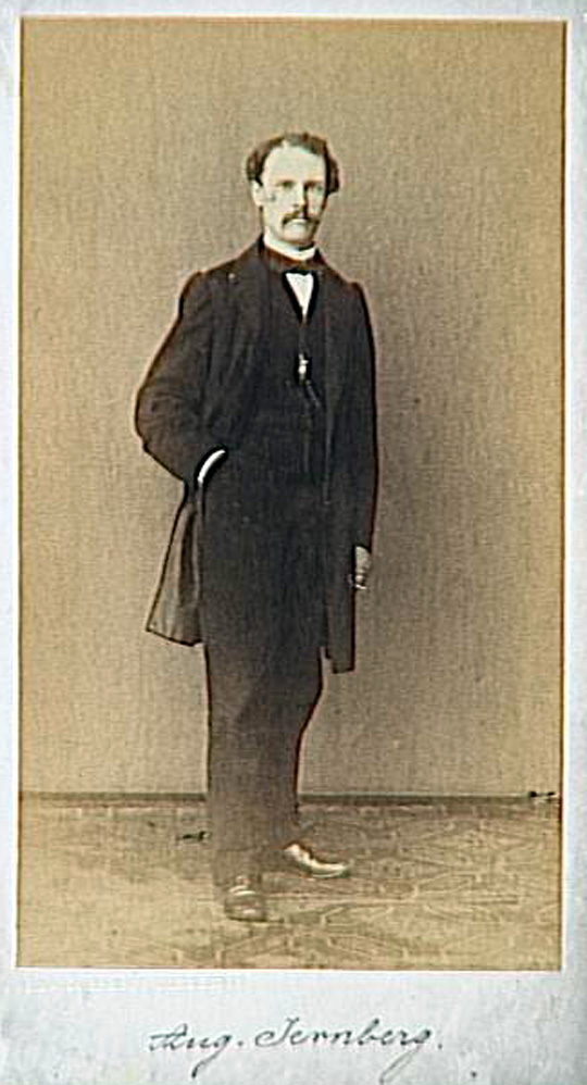 Fotografie von August Jernberg, Arnold Overbeck, Gebr. G. & A. Overbeck in Düsseldorf